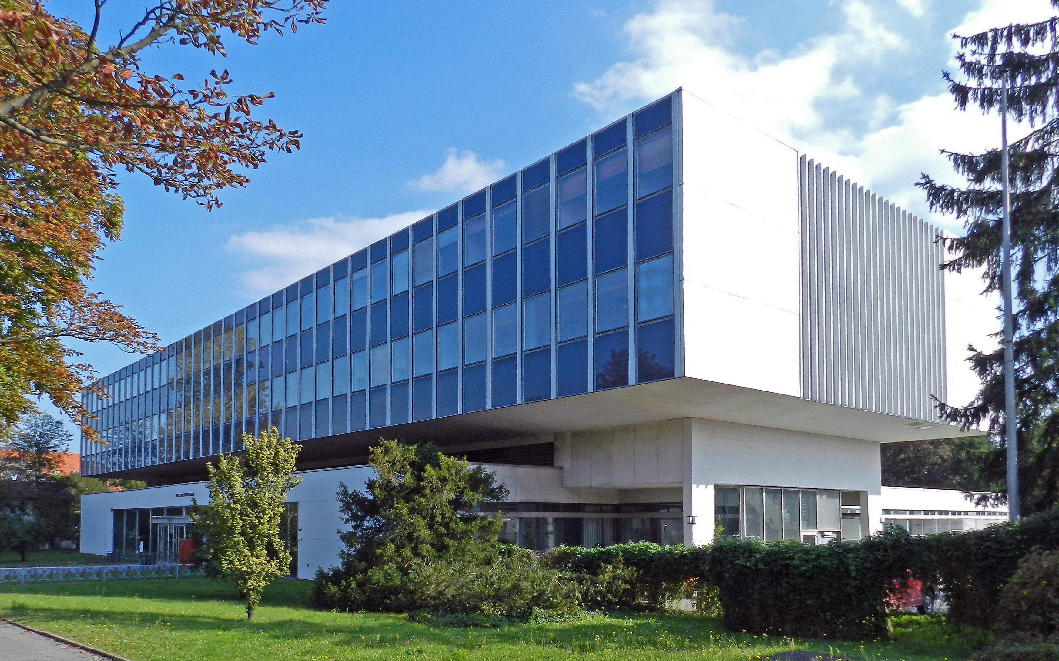 Institut für Pflanzenphysiologie und Mikrobiologie der Freien Universität Berlin, Königin-Luise-Str. 12-16, Berlin-Dahlem. Bauzeit: 1966-70 (Entwurf 1963), Entwurf: Wassili Luckhardt, Bauherr: Senator für Bau- und Wohnungswesen.